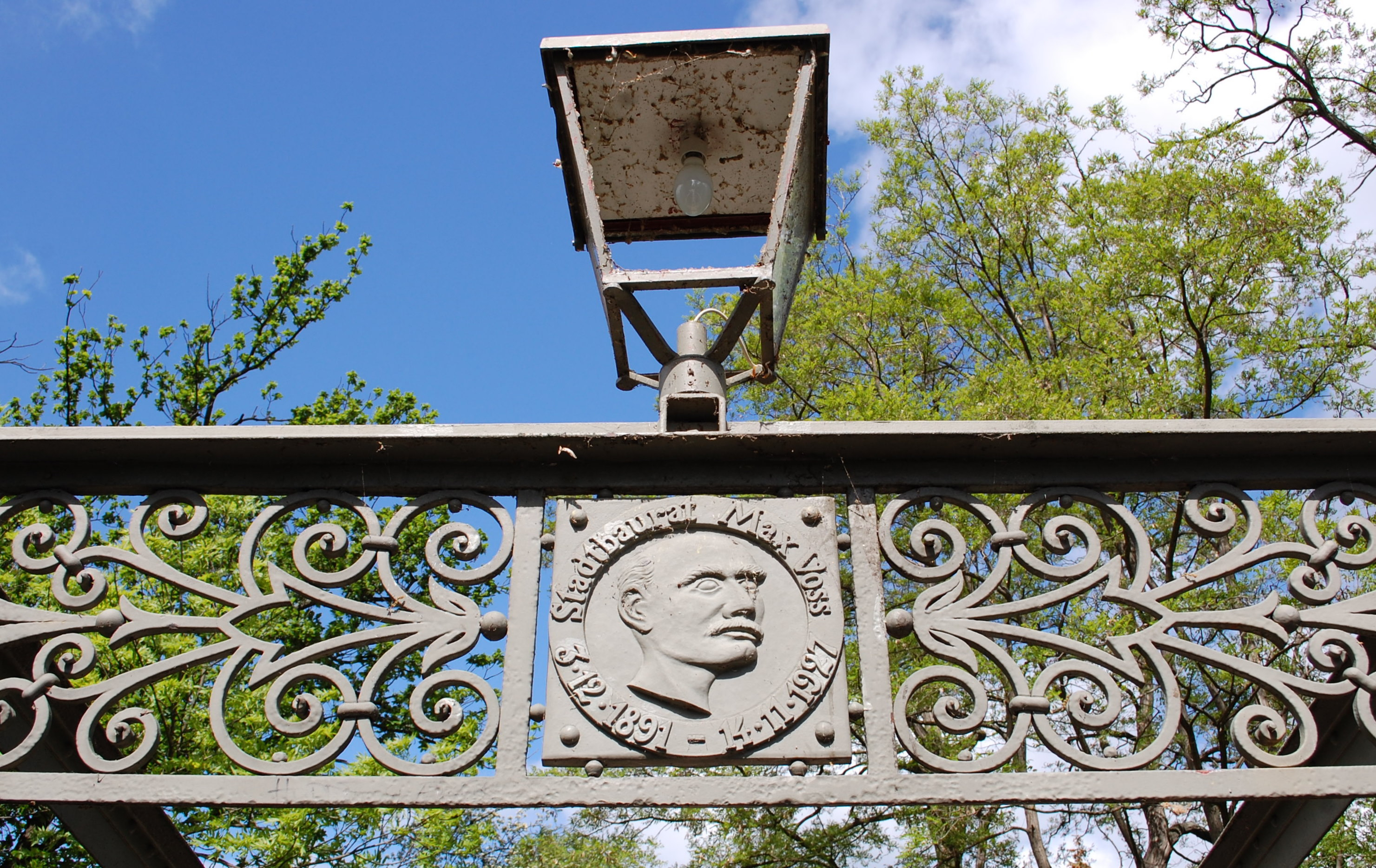 Detail an der Vossbrücke in Quedlinburg